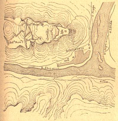 Plano francés del Sitio de Mequinenza